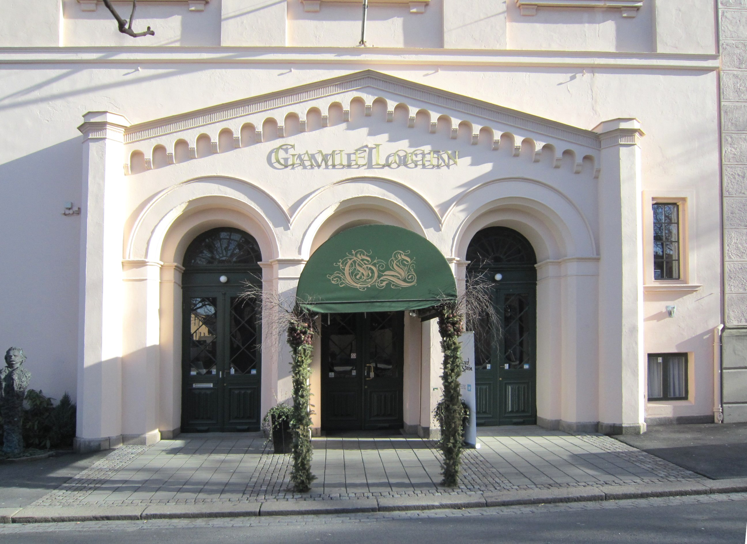 Gamle Logen i Oslo